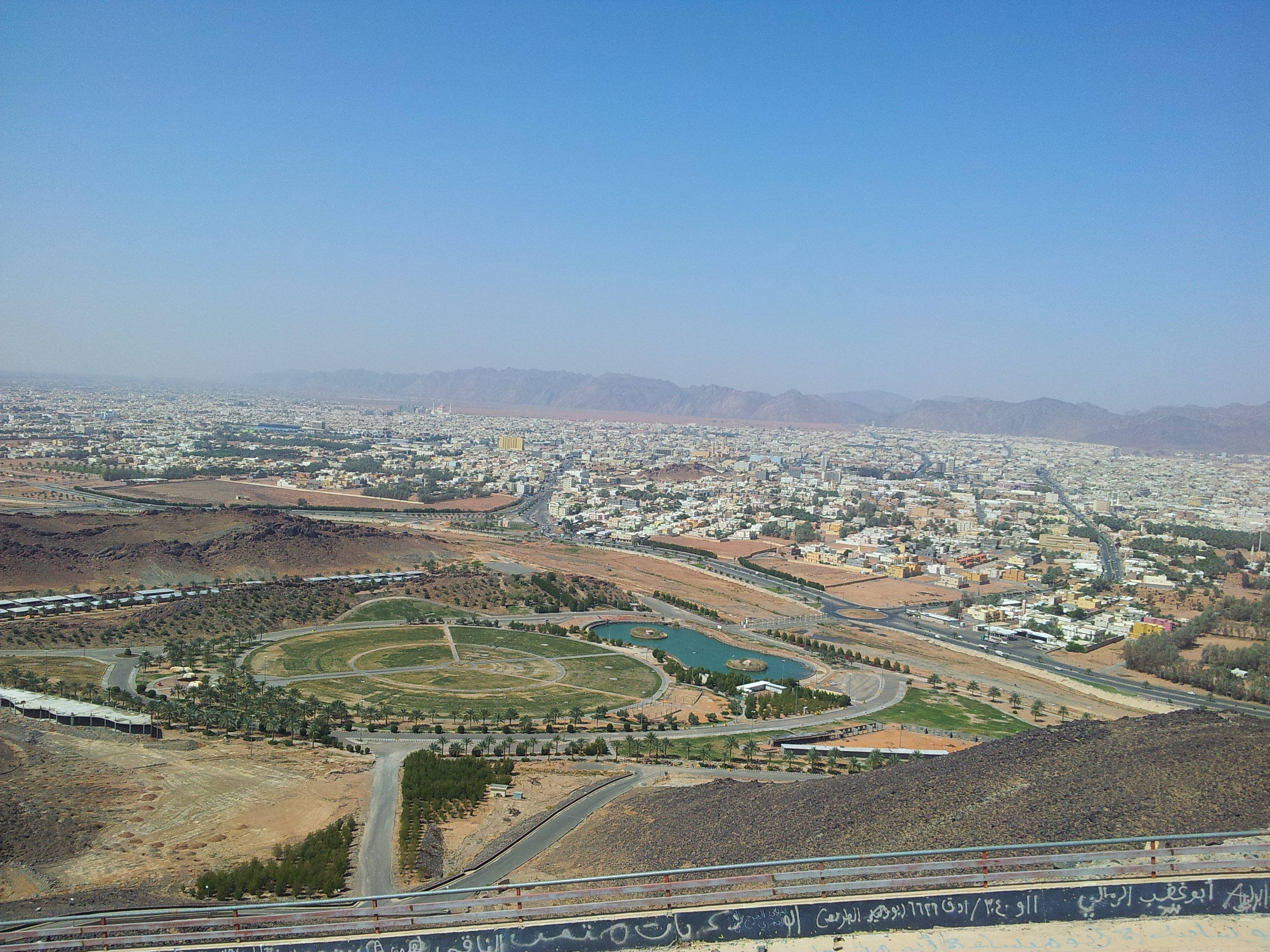 حائل